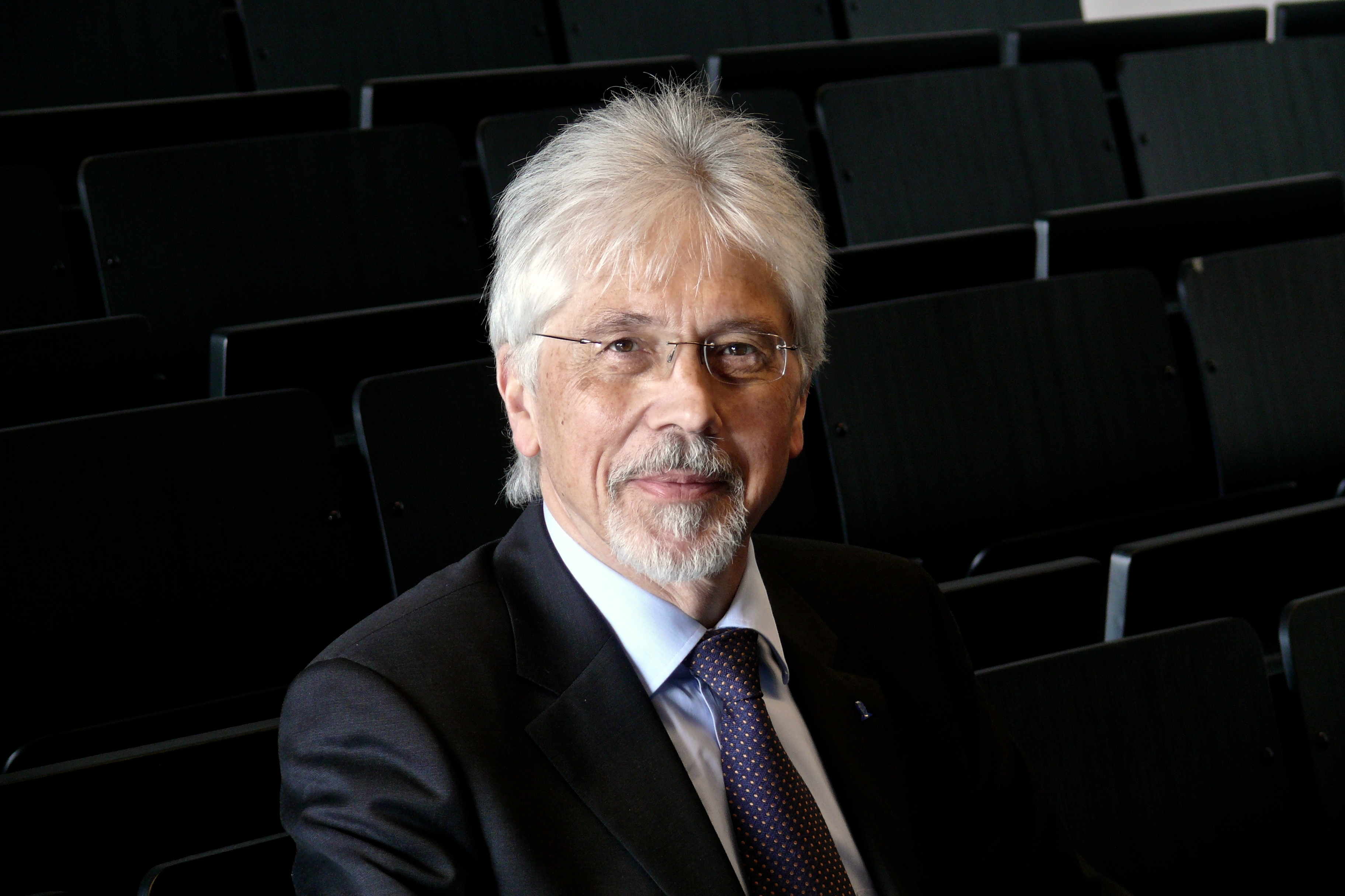 Werner Müller-Esterl, Präsident der Johann Wolfgang Goethe-Universität Frankfurt am Main